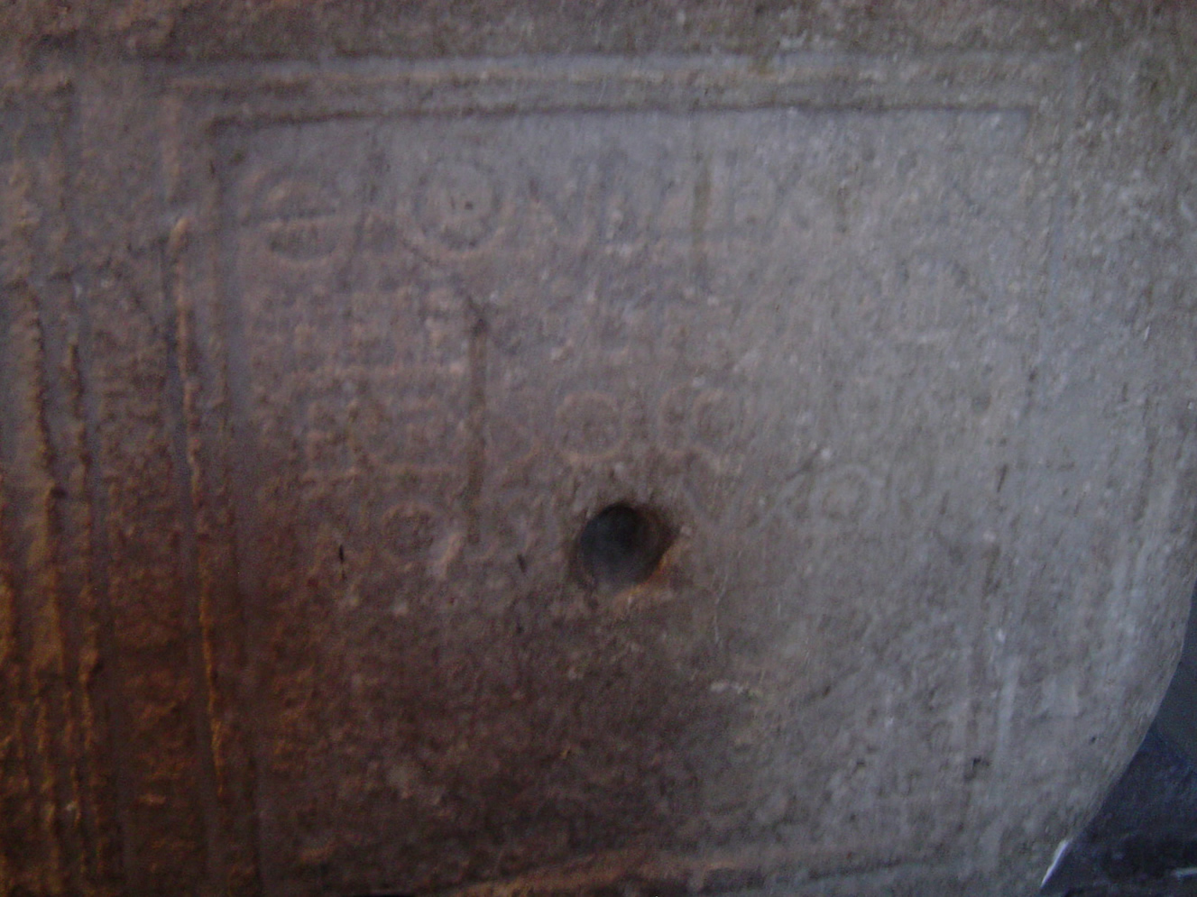 Anderexo Inskripzioa duen aldare akitaniarra.